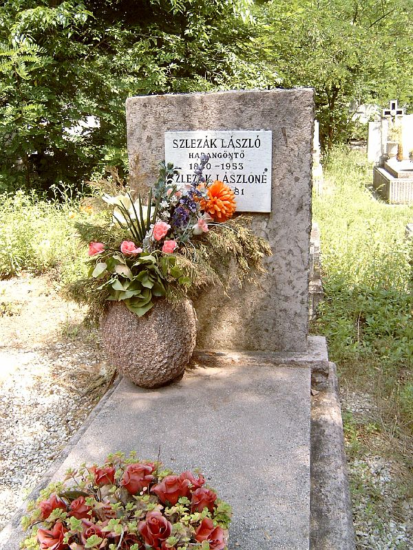 Szlezák László (1870-1953) harangöntőmester sírja Budapesten. Új köztemető: 114/X-1-51.